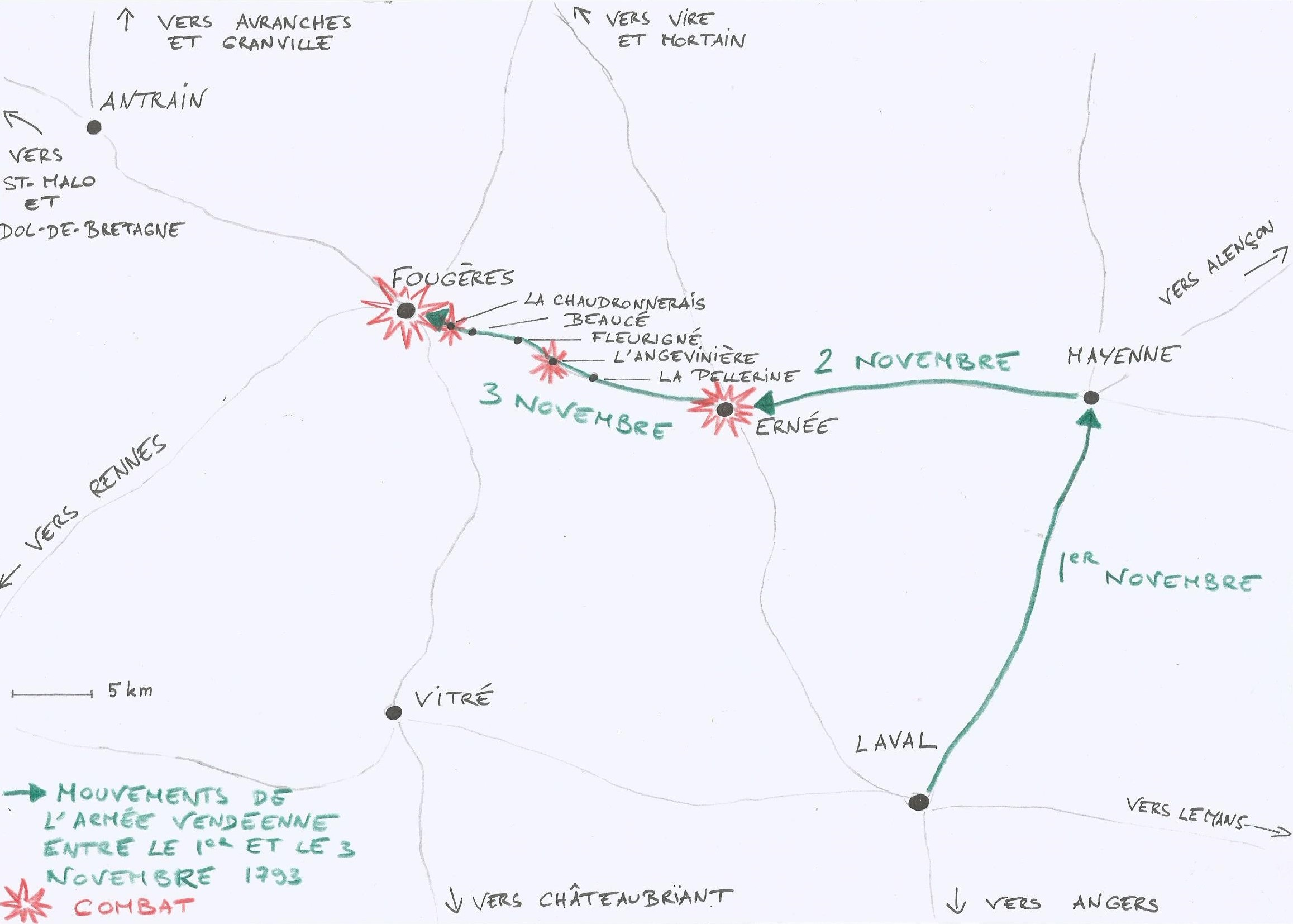 Parcours de l'armée vendéenne lors de la Virée de Galerne, entre le 1er le 3 novembre 1793.